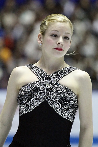 Грейси Голд (США) на командном чемпионате мира по фигурному катанию 2012